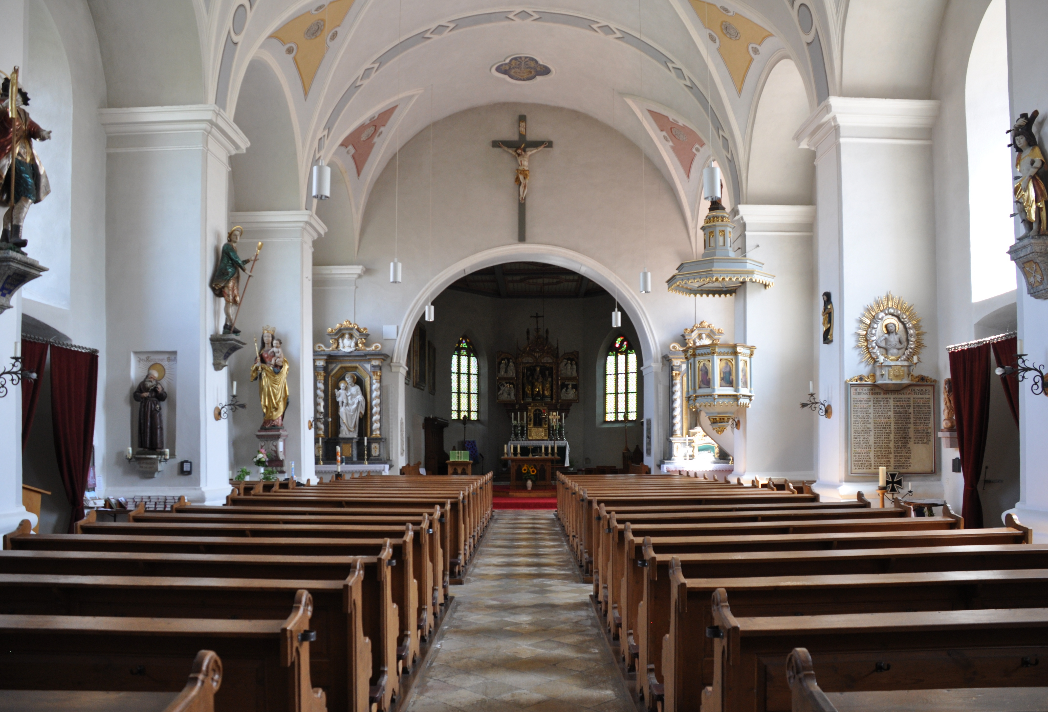 Abenberg, Kath. Pfarrkirche St. Jakob, Blick zum Chor